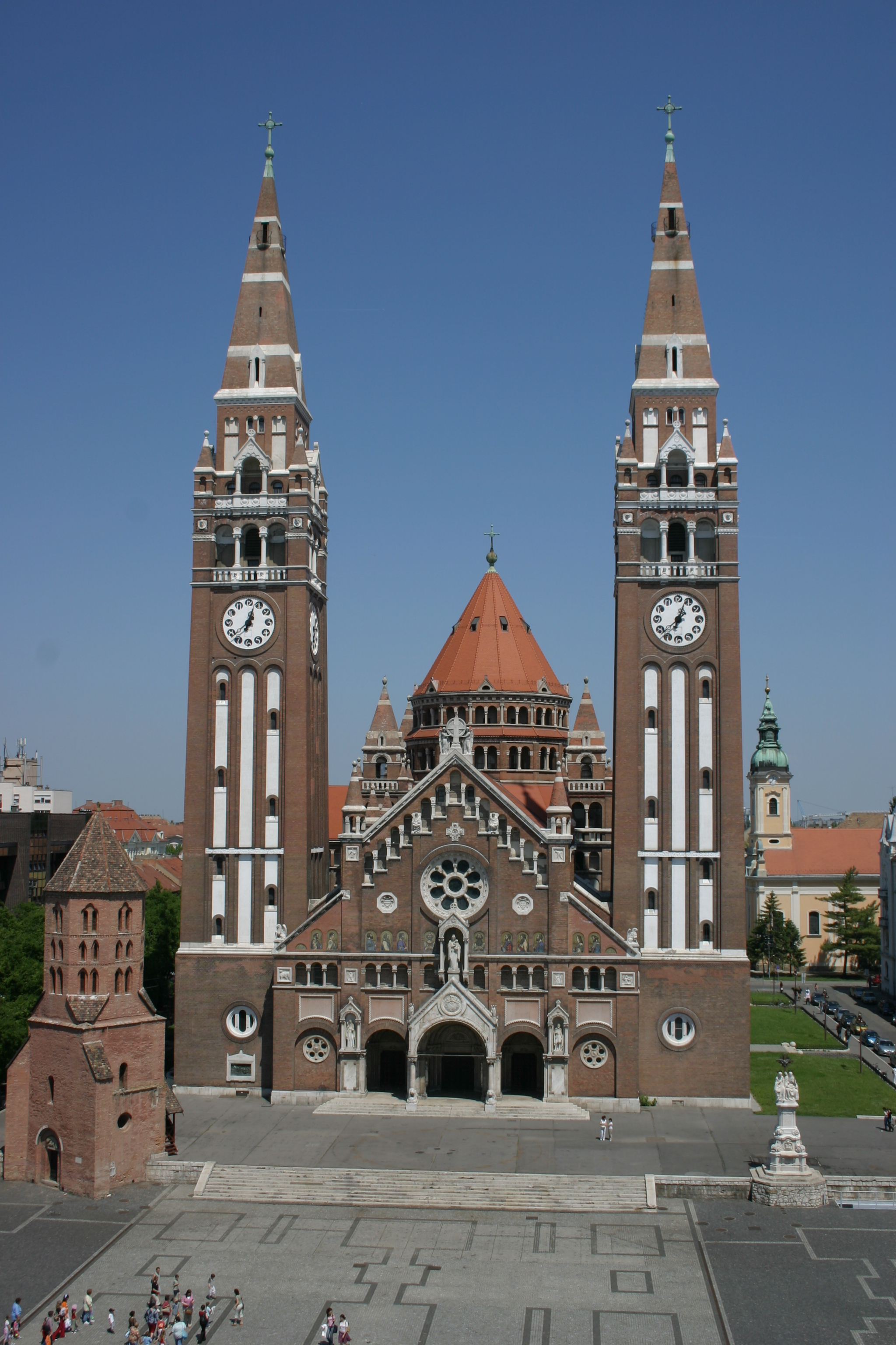 Dóm templom, Szeged (épült Foerk Ernő építész terve alapján)